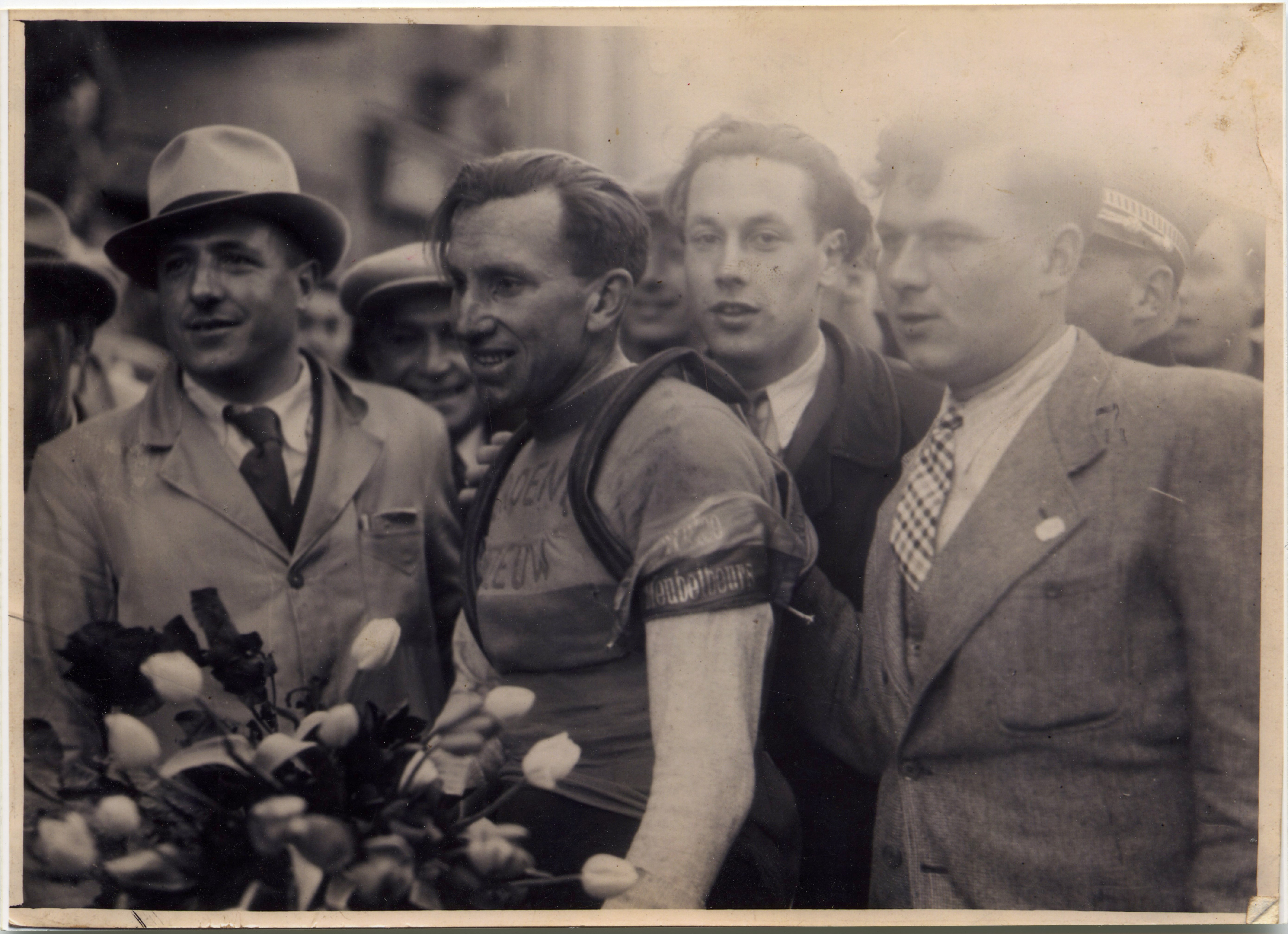 Anno 1946 wint Briek Schotte de eerste rit in Dwars door België met aankomst in Sint-Truiden. Zijn zege wordt volgens de pers bijzonder enthousiast onthaald in Waregem.